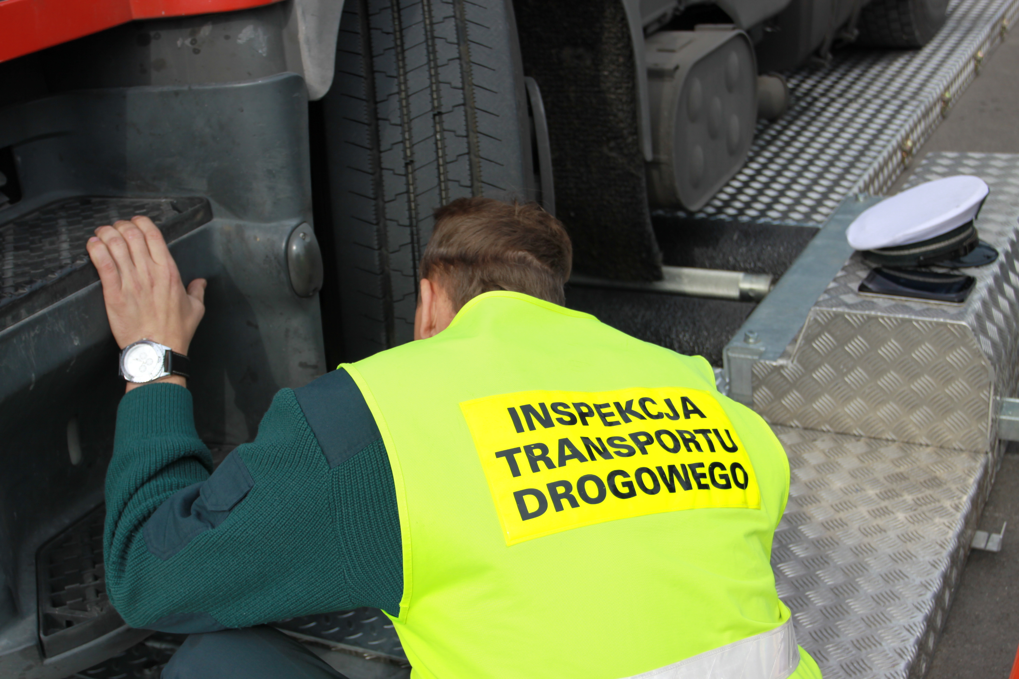 22.09.2011, Marszałek Sejmu odwiedził Suwałki, gdzie otworzył punkt kontroli i ważenia pojazdów.